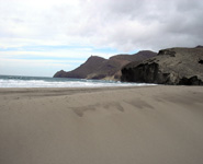 Cabo de Gata Natural Park, Almería, Spain Author: José Marco de la Rosa